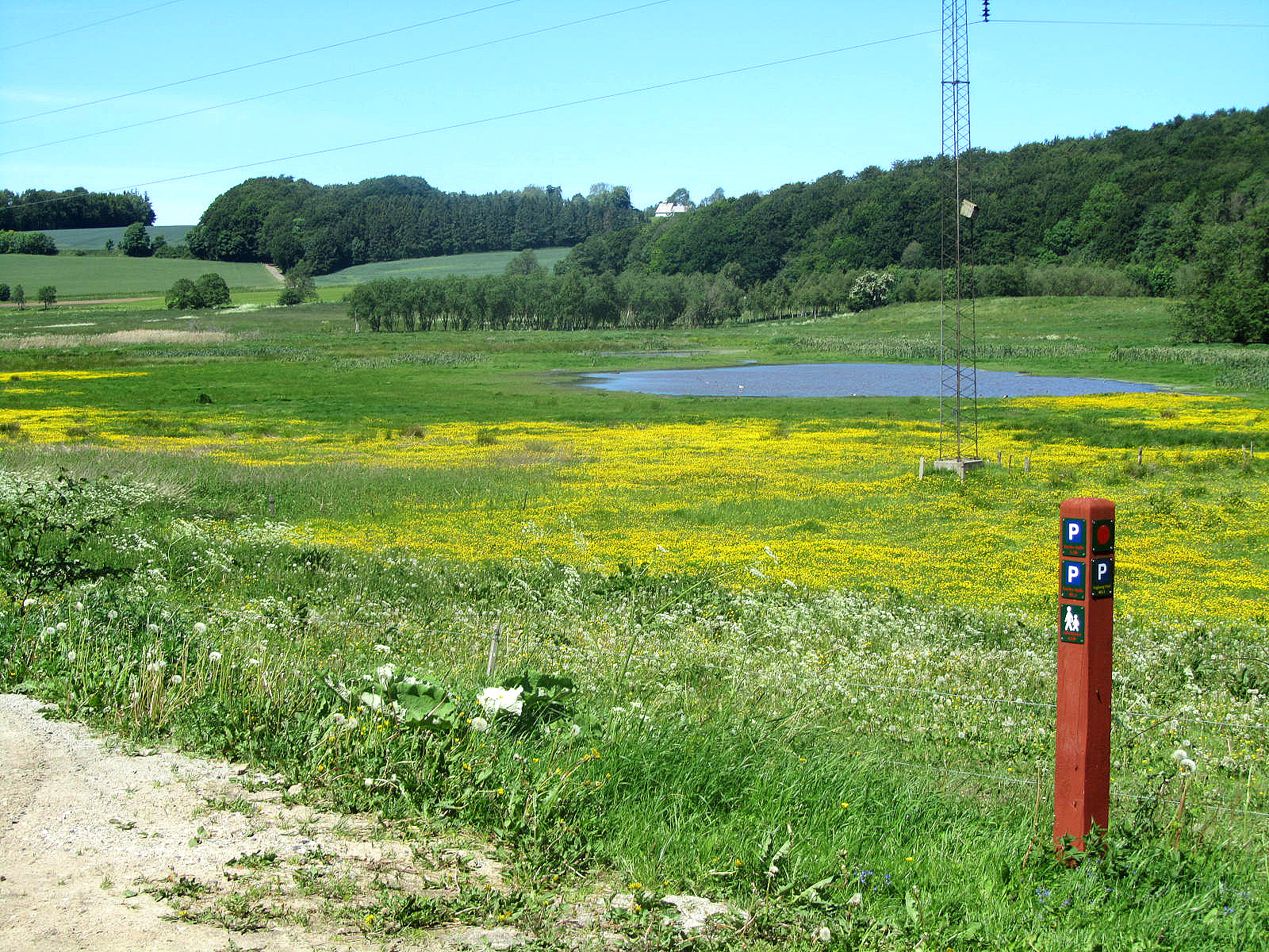 Illerup Ådal set mod vest